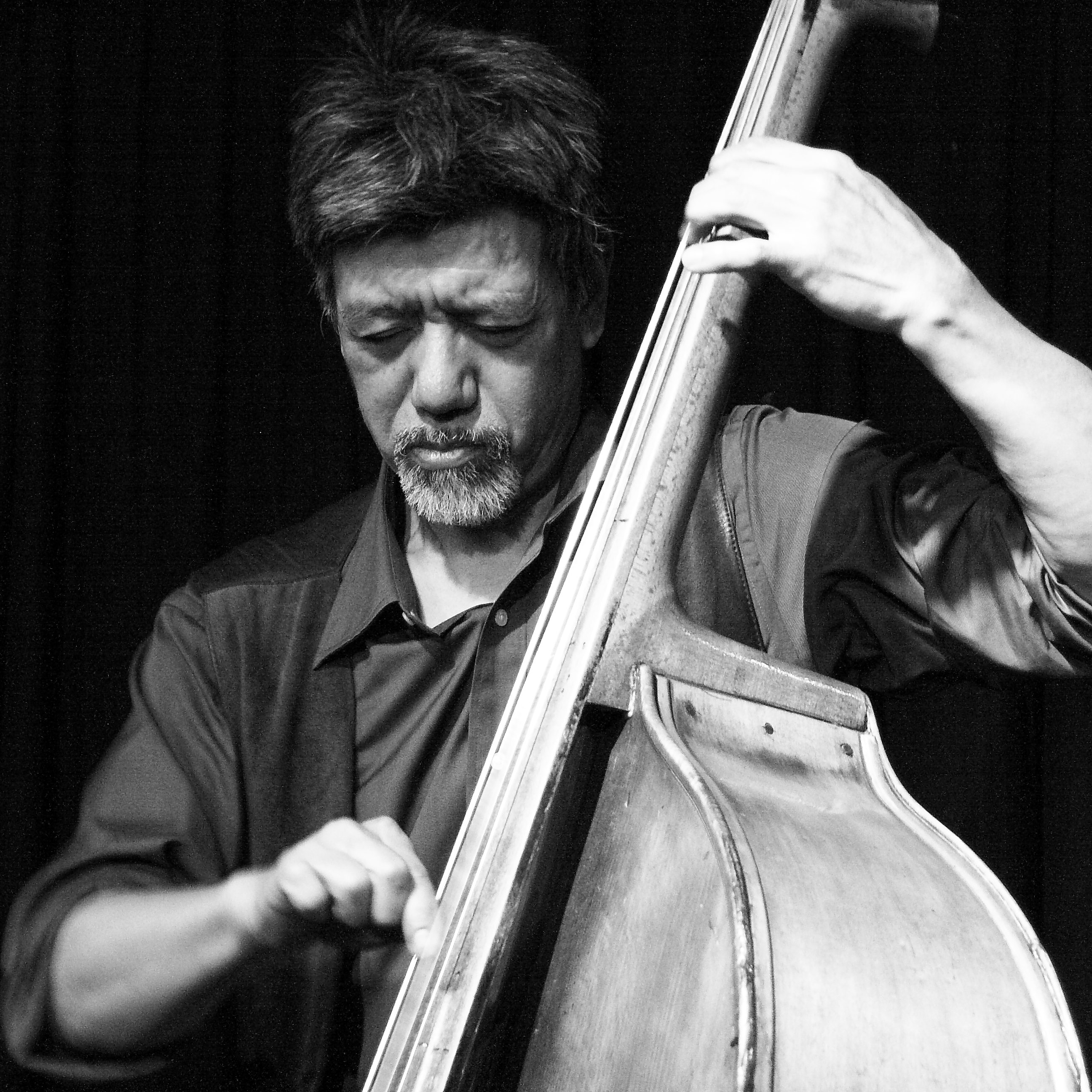 Konzert mit Boom Box (Akira Ando, Thomas Borgmann und Willi Kellers) im Club W71